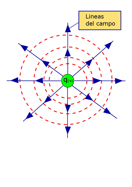 Representación de las lineas de campo y equipotenciales que produce una carga positiva